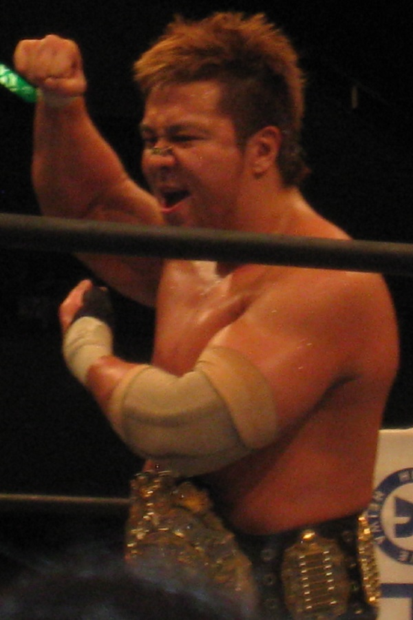 2010年12月11日 大阪府立体育会館「NEW JAPAN ALIVE」 小島聡